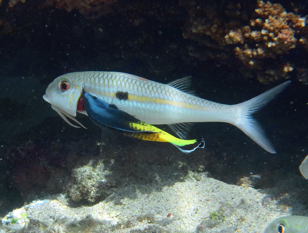 Un labre nettoyeur à queue jaune (Labroides bicolor) en train de déparasiter un Mulloidichthys flavolineatus à la Réunion.